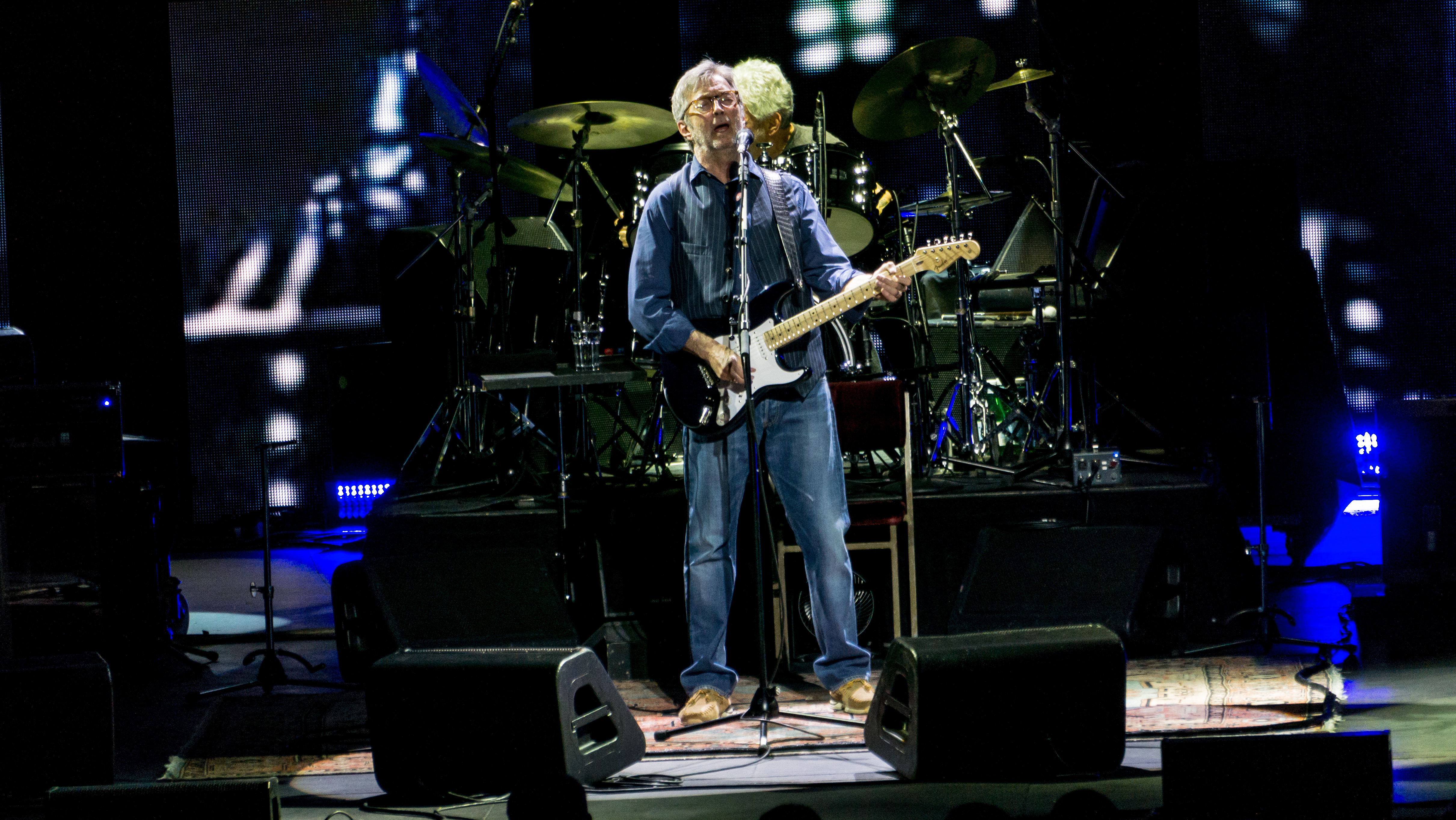 EricClaptonRAH240517-4